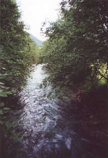 Gschnitzbach oberhalb von Trins. geschossen im Sommer 2006 von mir selber, kann frei benutzt werden.